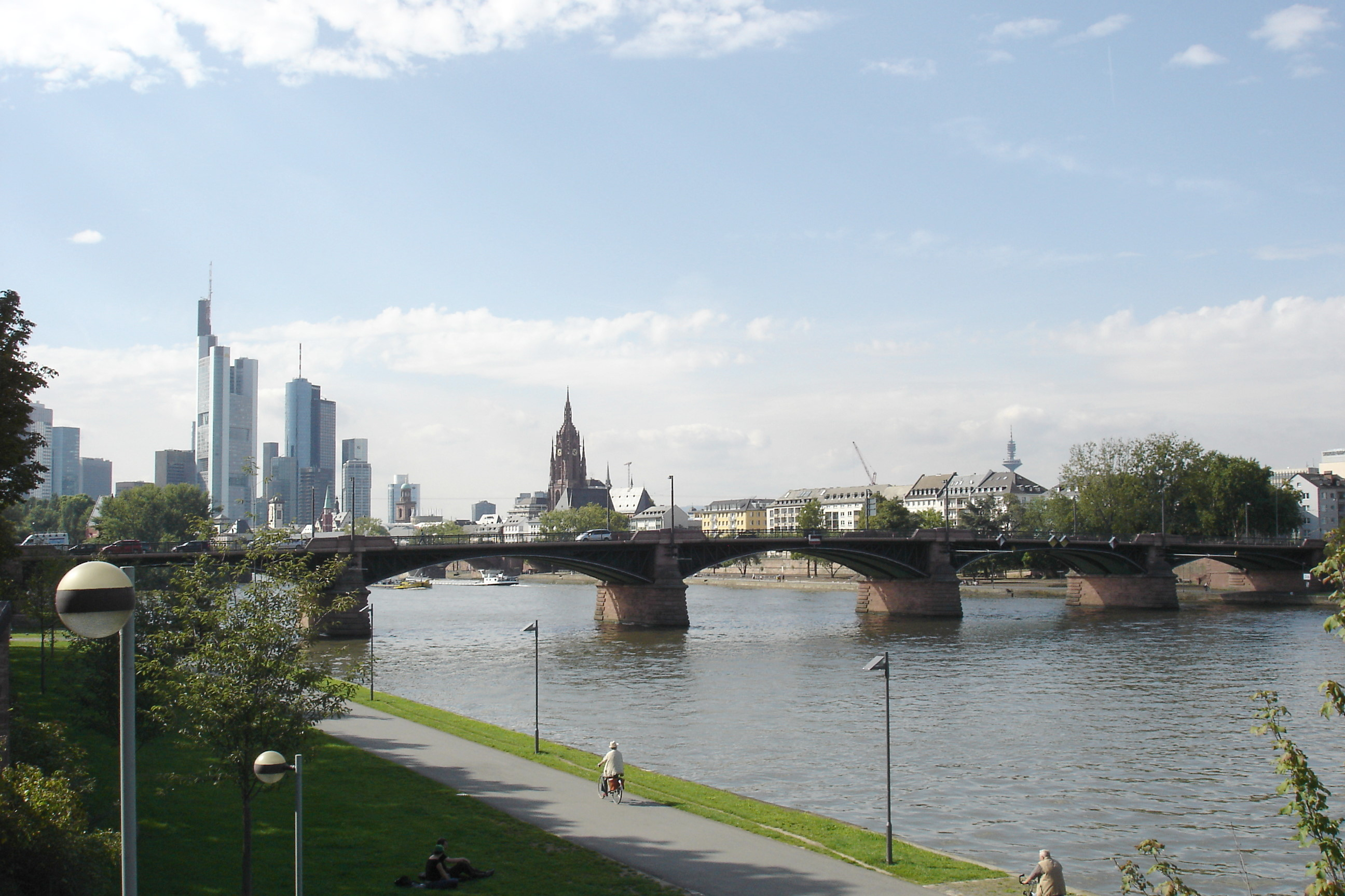 Ignatz-Bubis-Brücke vor Panorama mit Dom in Frankfurt